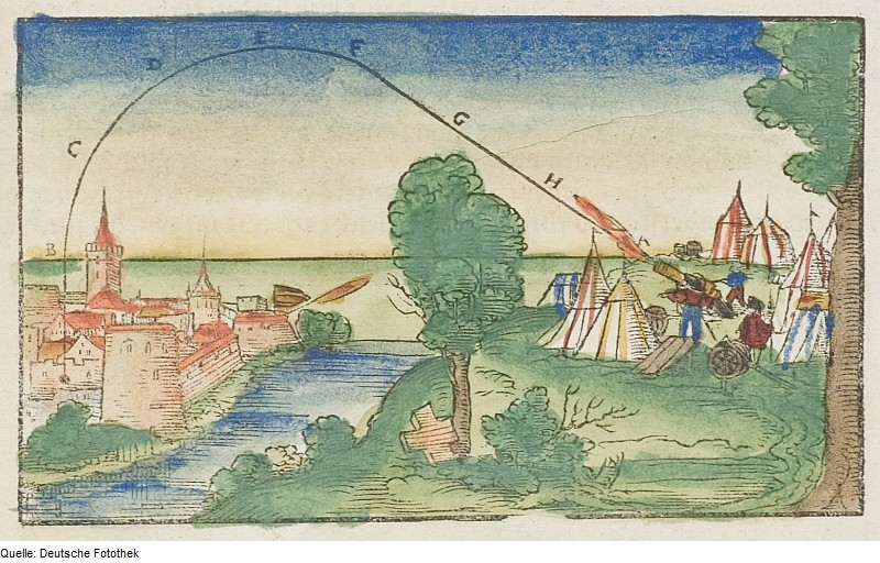 Original image description from the Deutsche Fotothek Ballistik & Kanone